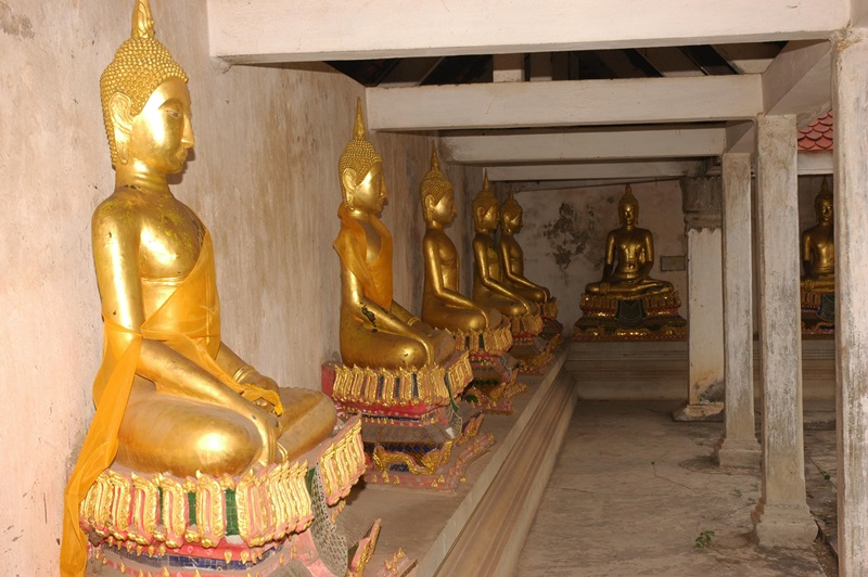 เป็นพระพุทธรูปหินทรายแดง นิ้วพระหัตถ์กางแบบปาละ หน้าพระเป็นรูปไข่แบบอู่ทองหน้านาง ประติมากรรมสมัยก่อนกรุงศรีอยุธยา